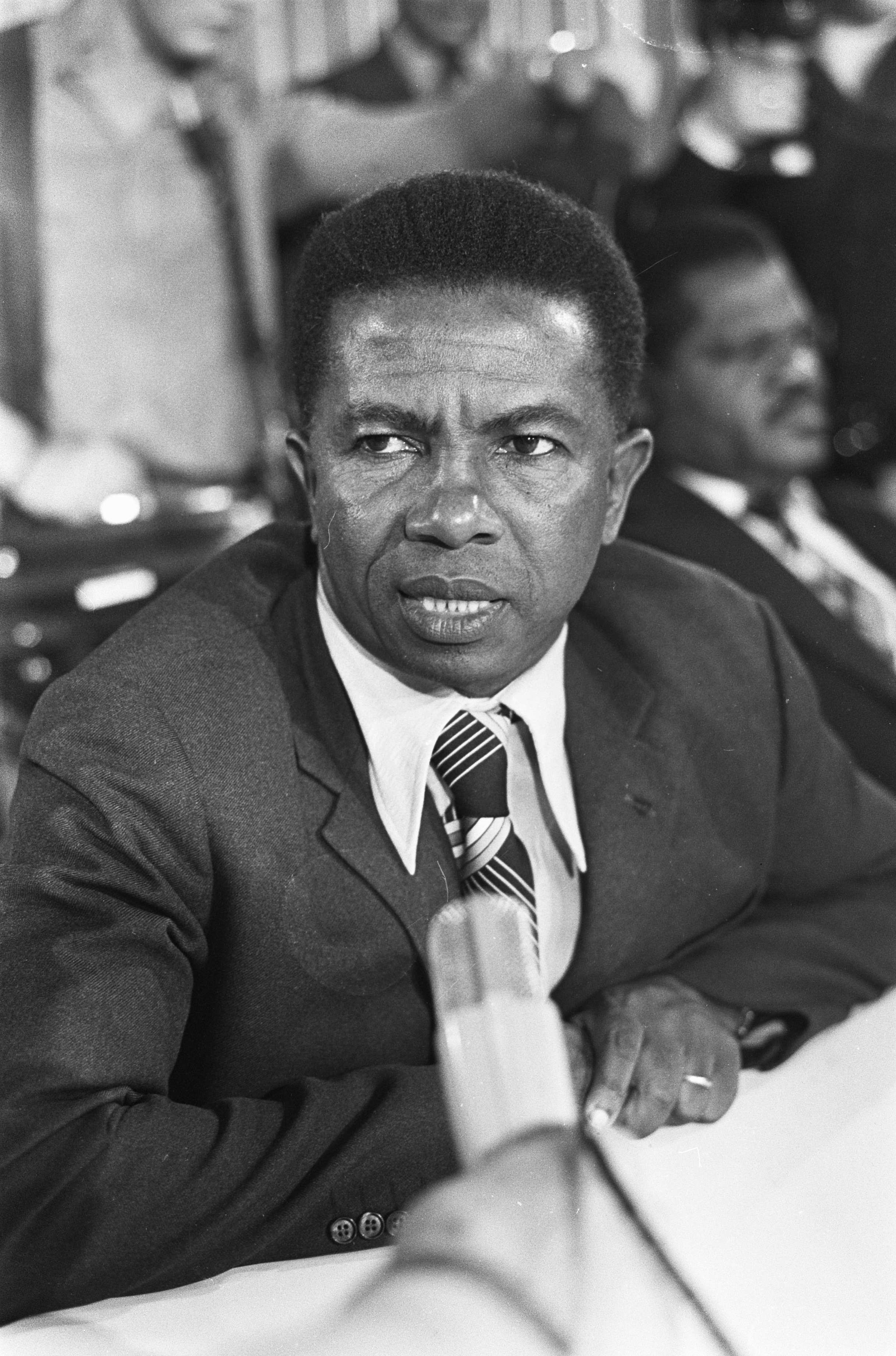 Collectie / Archief : Fotocollectie Anefo Reportage / Serie : [ onbekend ] Beschrijving : Surinaamse statenvoorzitter Emile Wijntuin tijdens persconferentie op Schiphol Datum : 16 oktober 1975 Locatie : Noord-Holland, Schiphol Trefwoorden : persconferenties Persoonsnaam : Wijntuin, E.L.A. Fotograaf : Peters, Hans / Anefo Auteursrechthebbende : Nationaal Archief Materiaalsoort : Negatief (zwart/wit) Nummer archiefinventaris : bekijk toegang 2.24.01.05 Bestanddeelnummer : 928-2113